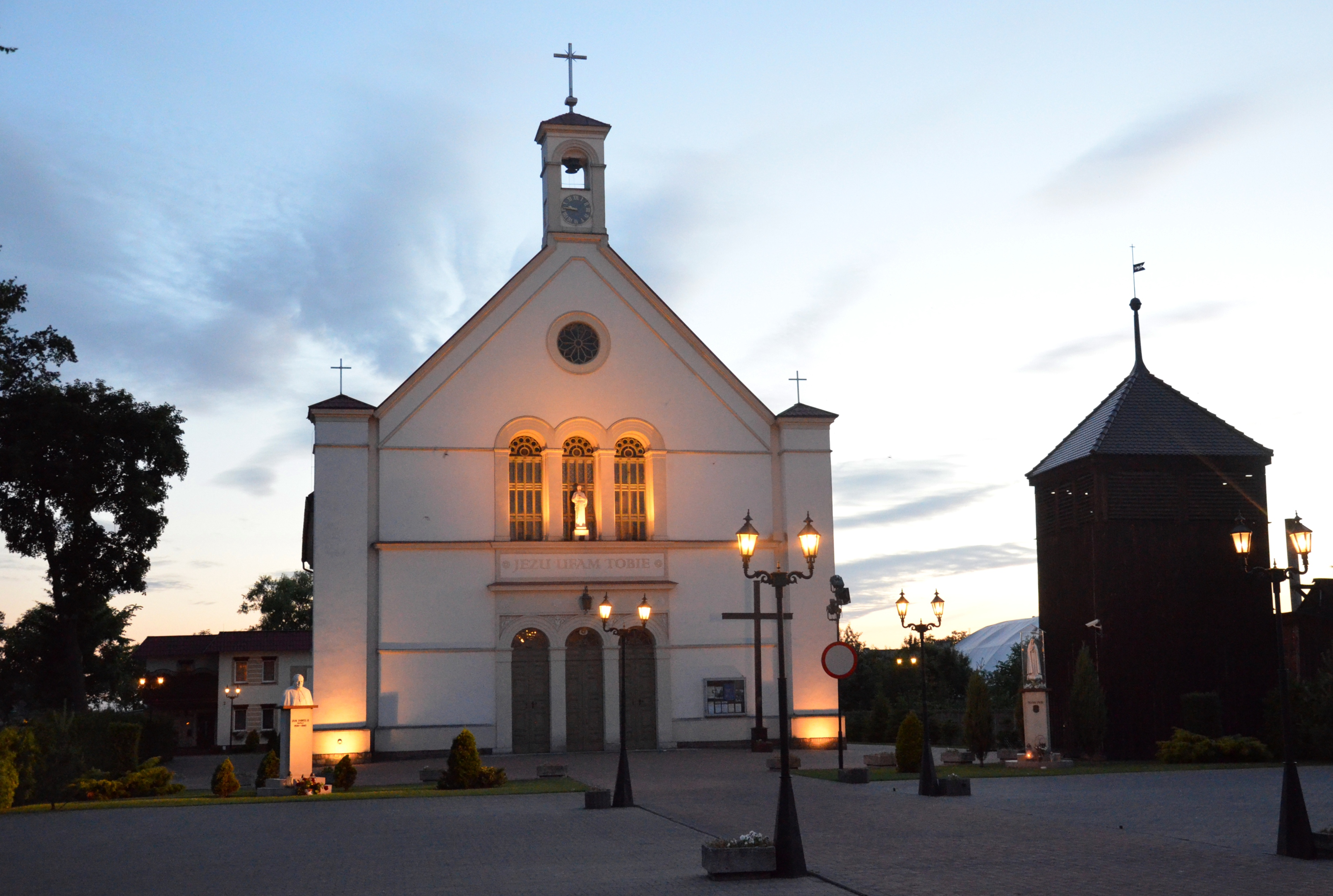 Rogoźno, zespół kościoła ewangelickiego, ob. rzym.-kat. par. p.w. Św. Ducha